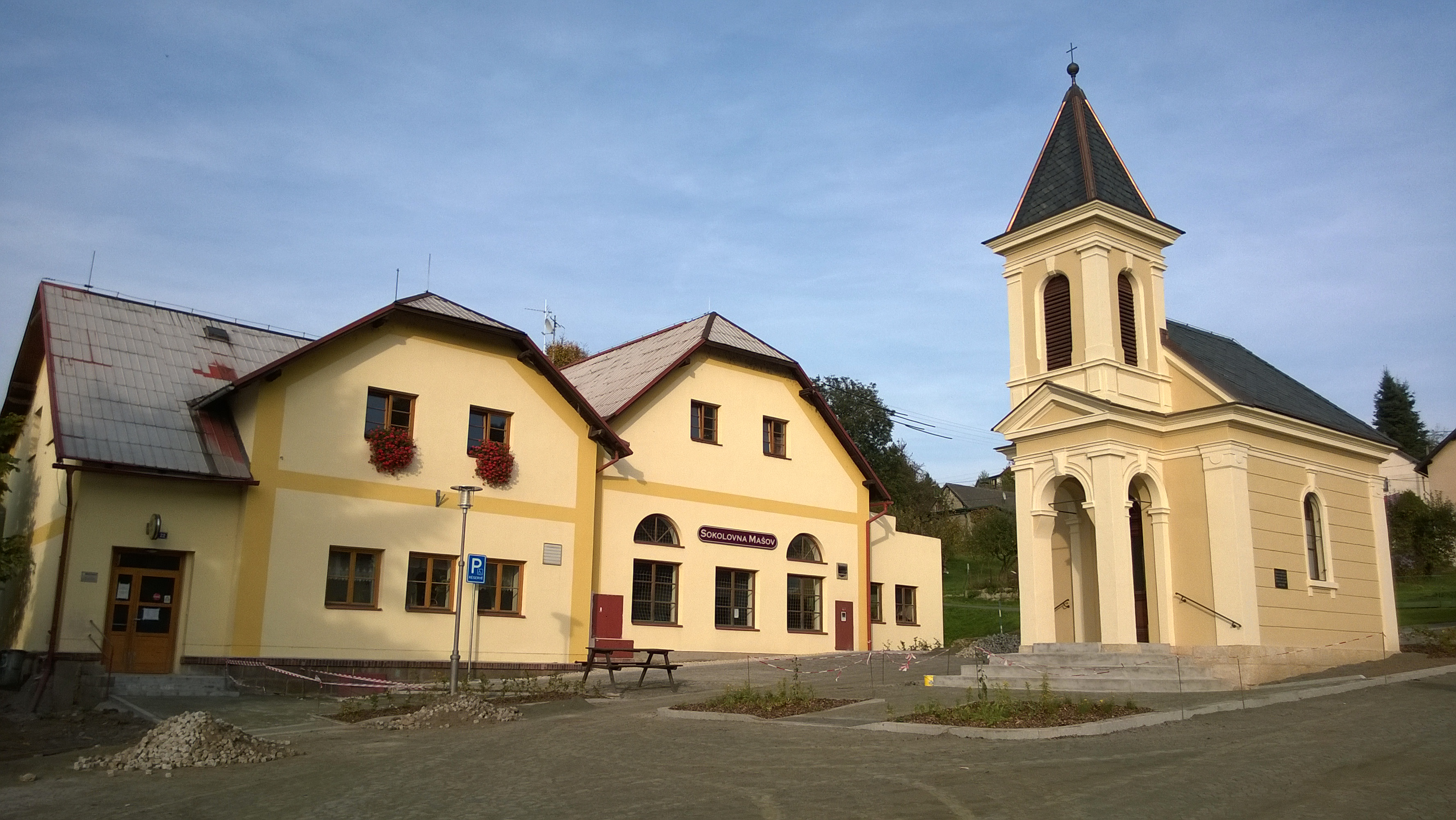 Mašov - celkový pohled